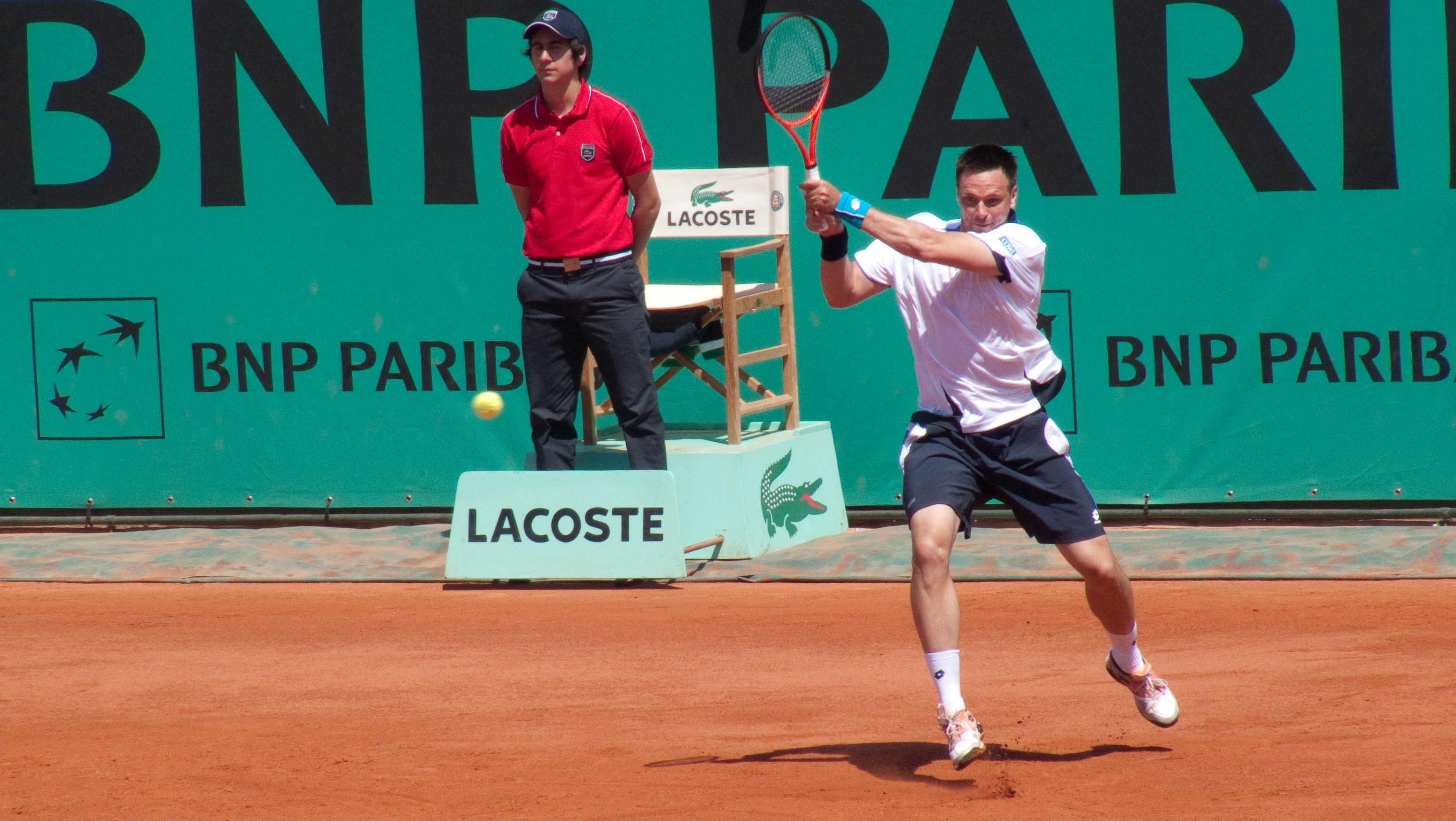 Robin Soderling vs Laurent Recouderc